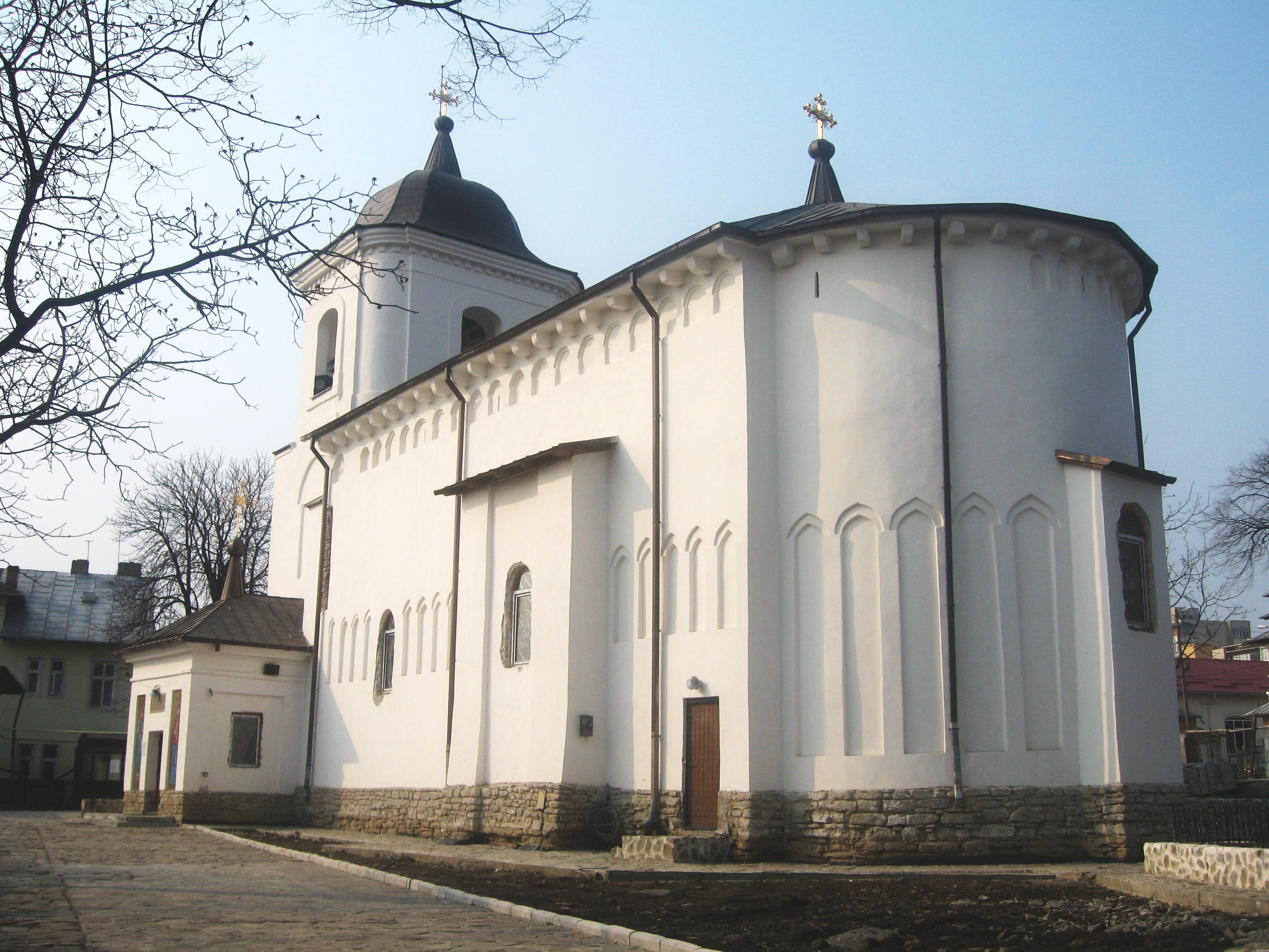 Biserica Sf. Ioan Botezătorul din Iași